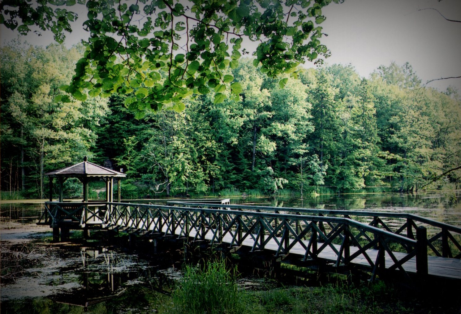 Autor: Adrian Grzegorz Rok utworzenia: 2003